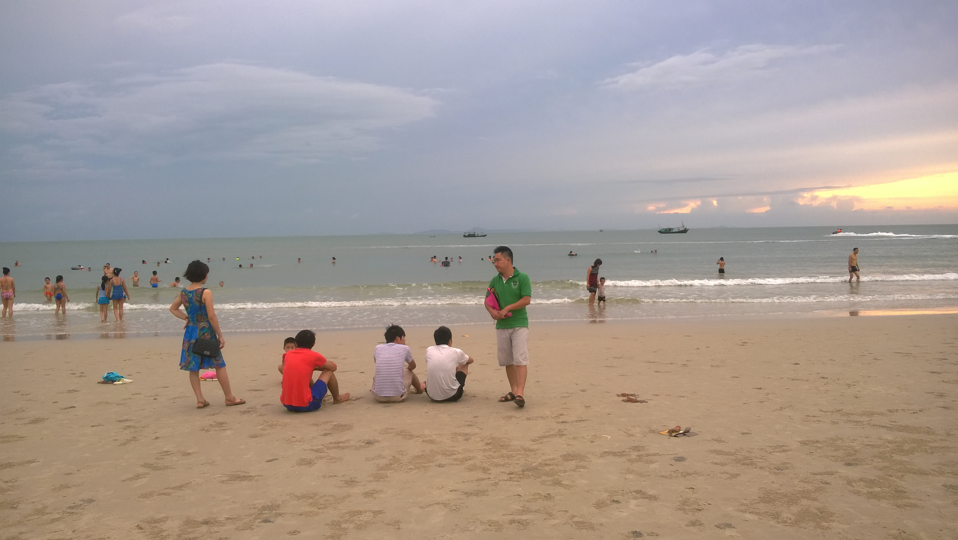 Bãi tắm Thủy Triều ở đảo Cồn Nổi, Kim Sơn, Ninh Bình